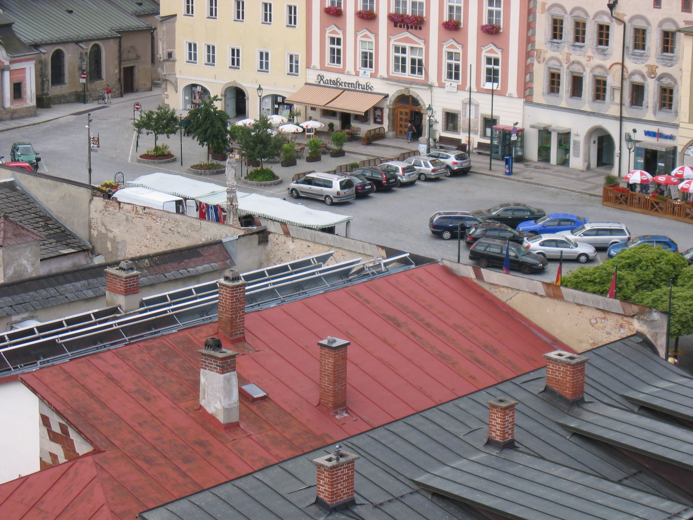 Feuermauern am Hauptplatz